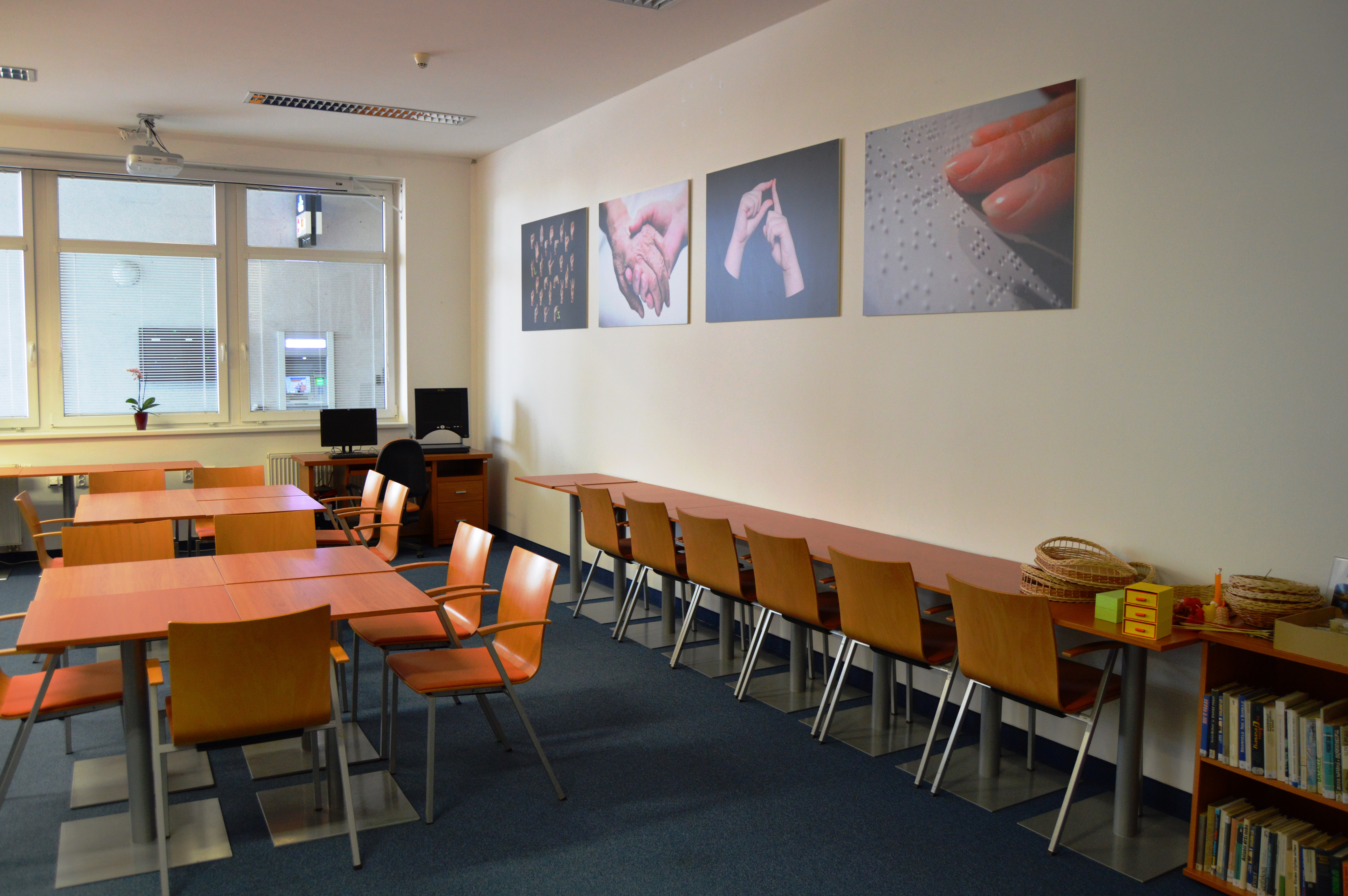 Oddělení pro handicapované čtenáře. Konají se zde také přednášky, filmová promítání, kurzy apod.